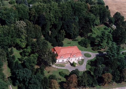 Ráksi, Hungary, aerialphotography